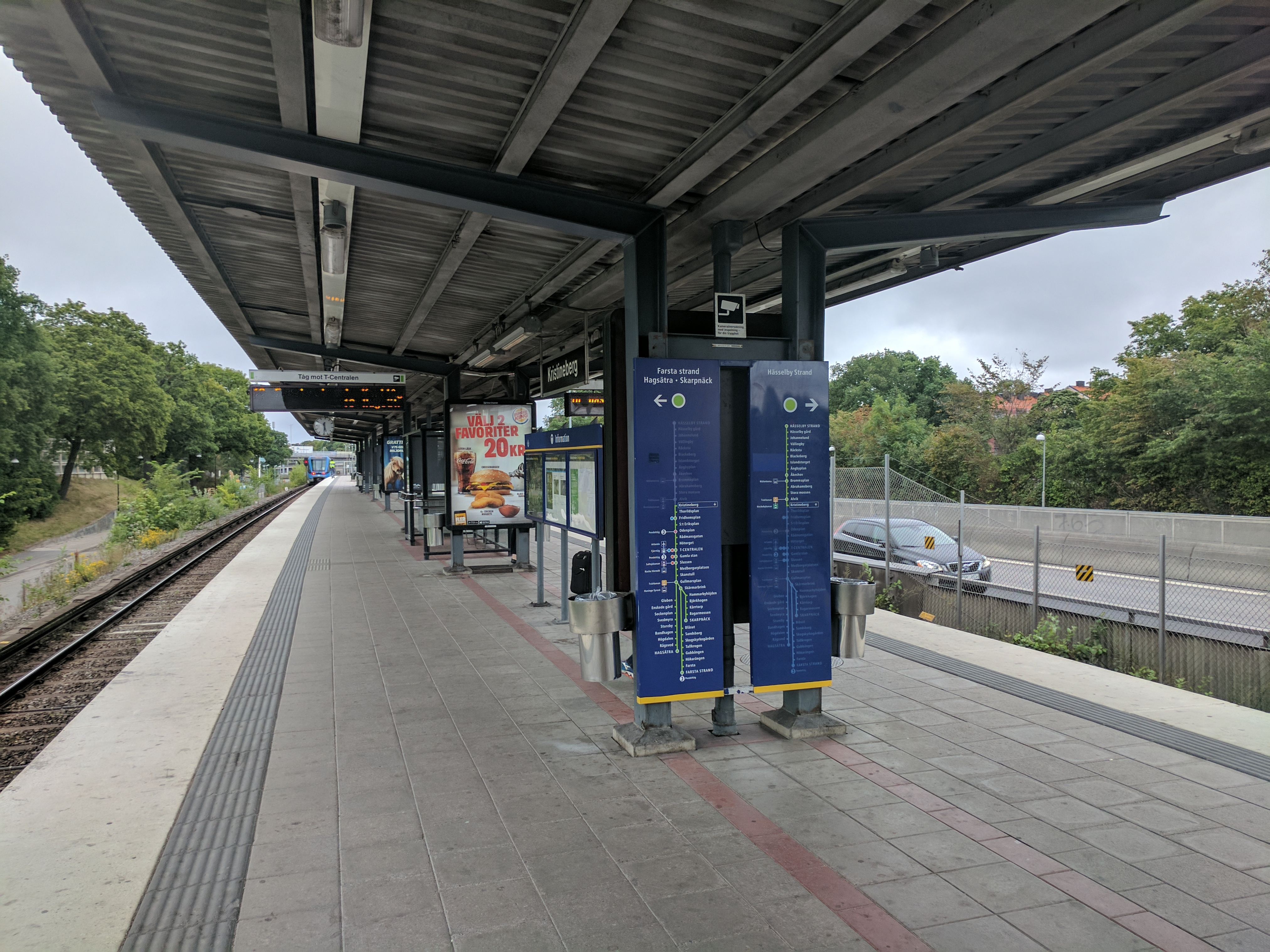 Kristineberg 20170813